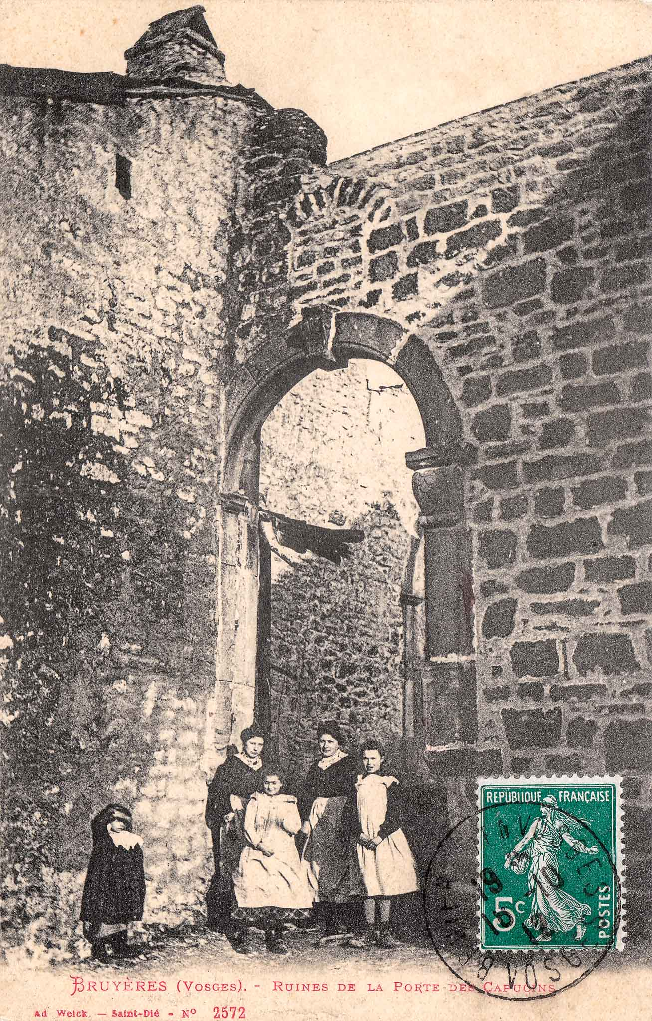 Carte postale ancienne "BRUYÈRES (VOSGES) - RUINES DE LA PORTE DES CAPUCINS"